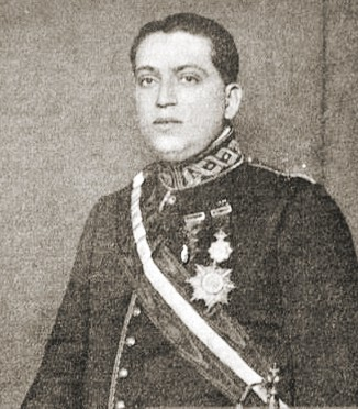 José Calvo Sotelo (1893-1936), con uniforme del Cuerpo de Abogados del Estado.